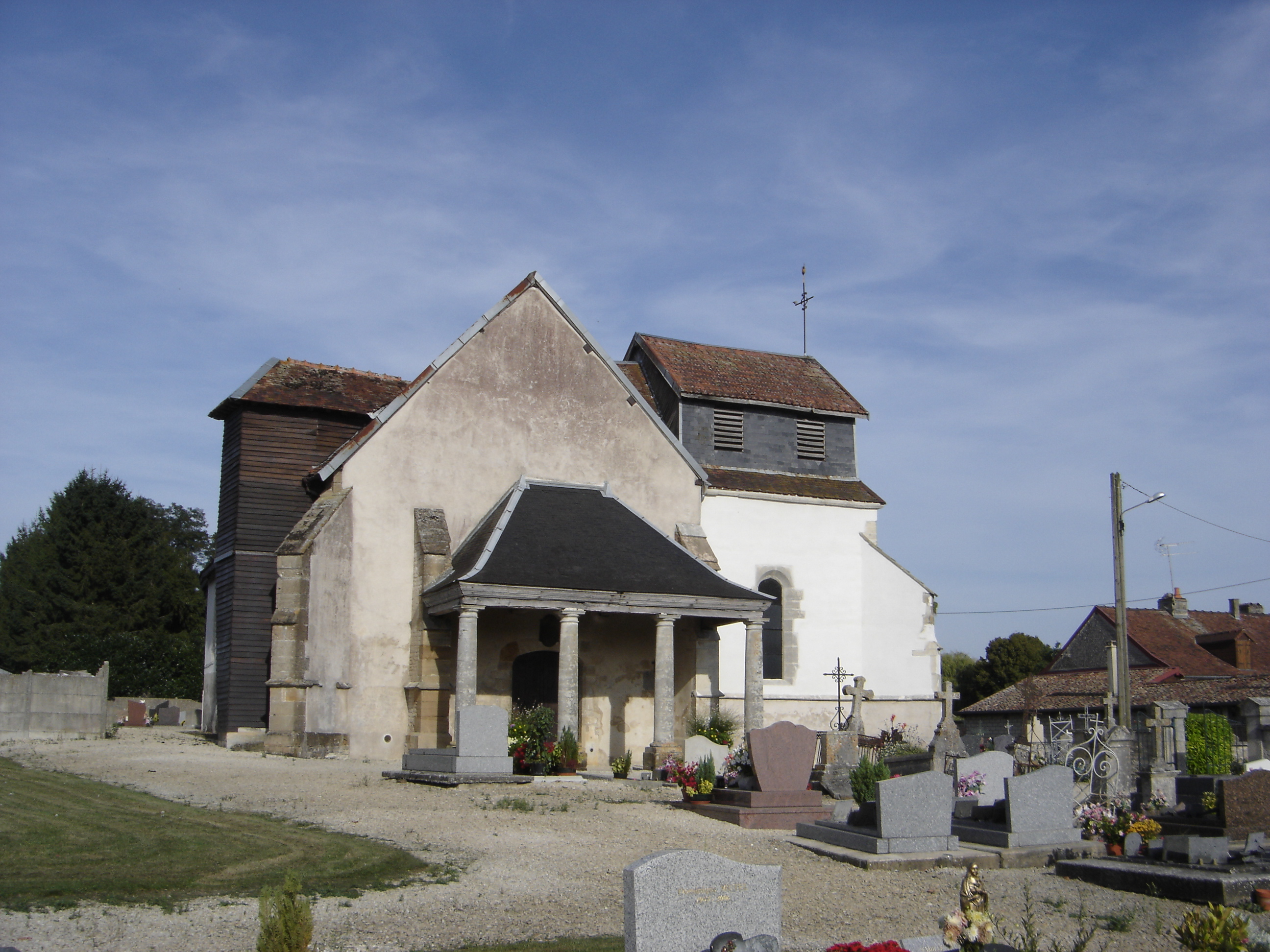 Eglise Notre-Dame de l'Assomption de Radonvilliers - Aube - France